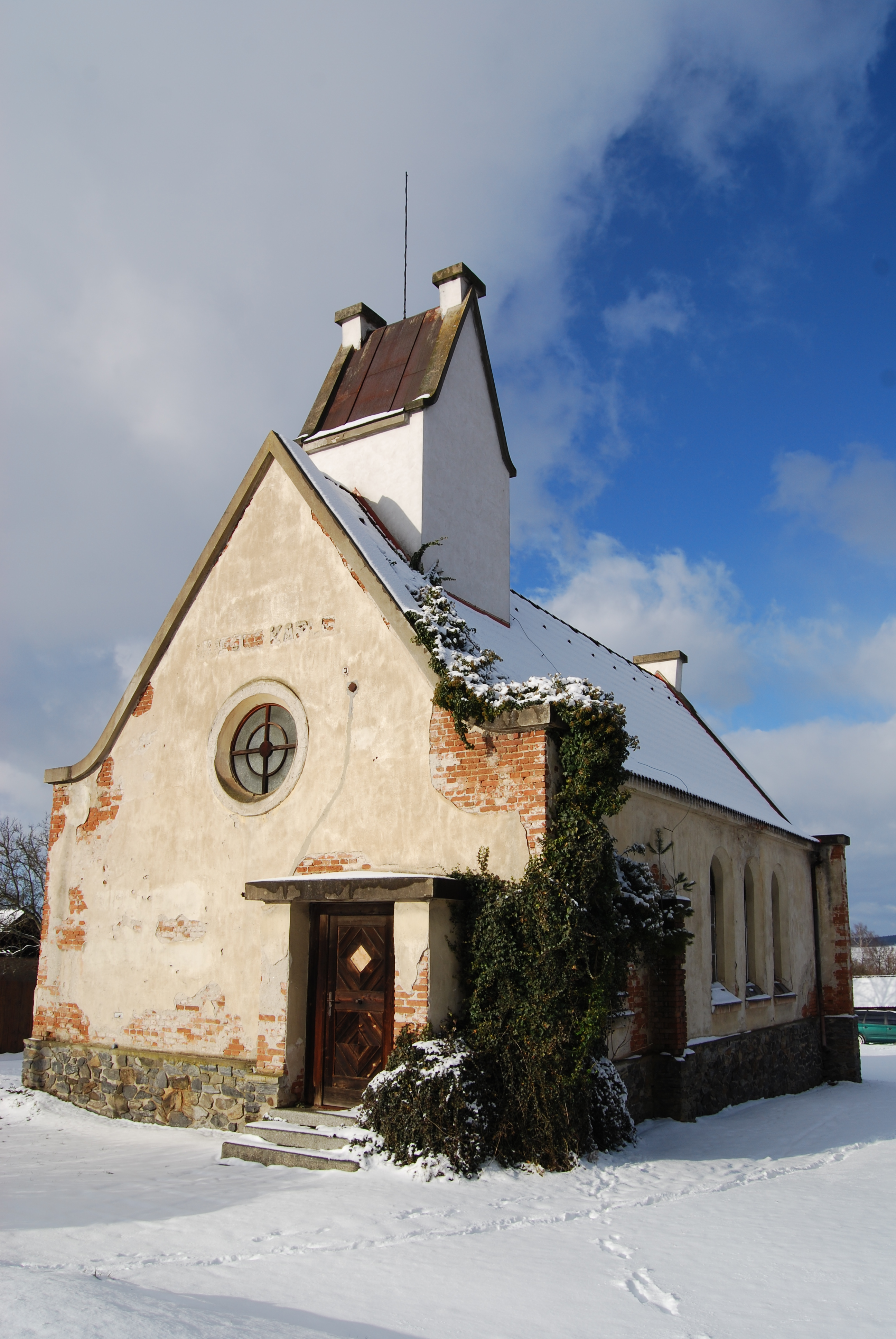 Husova kaple. Bernartice. Okres Písek. Česká republika.